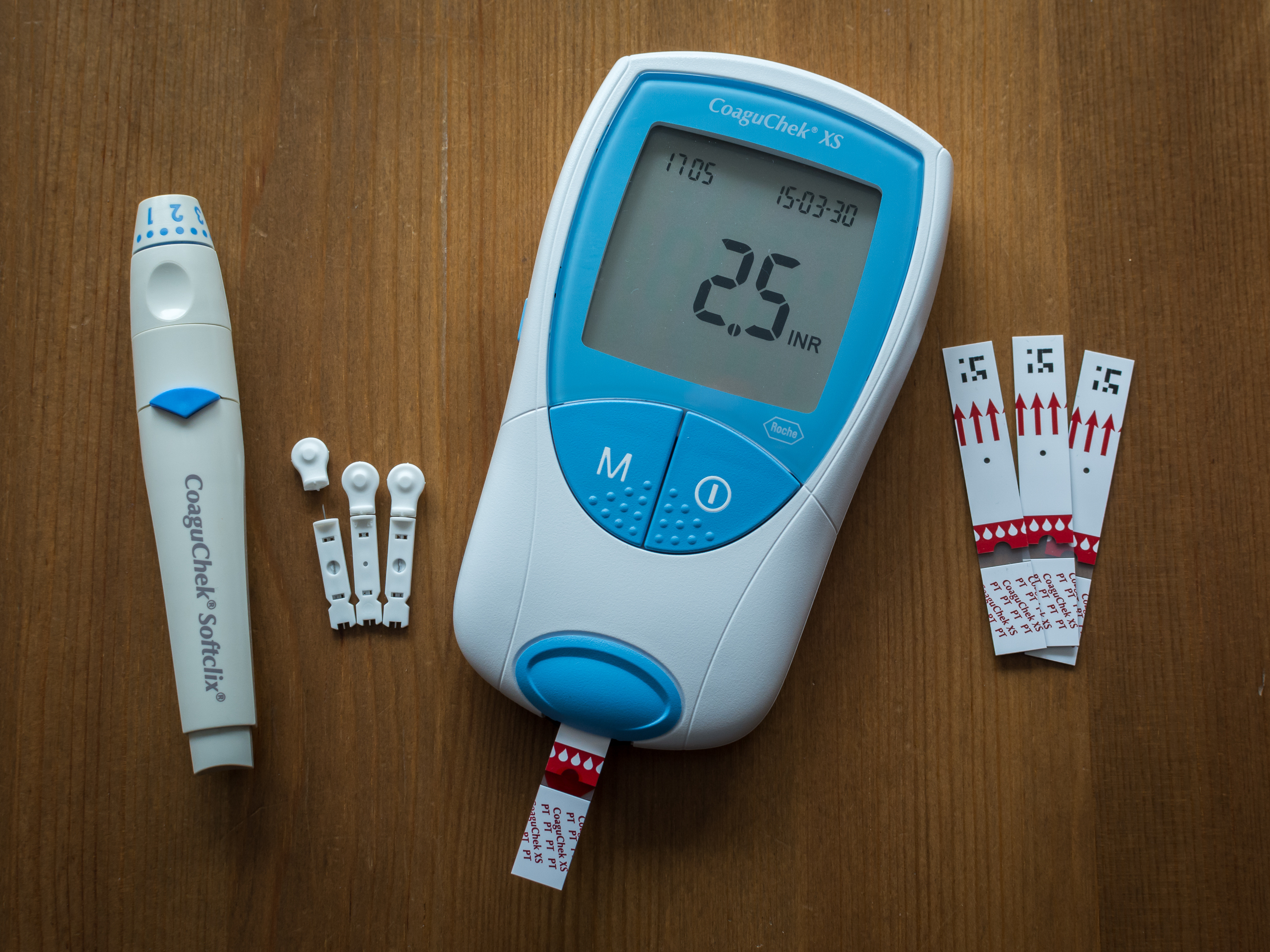 Gerinnungsmonitor zur Bestimmung der Blutgerinnung (INR-Wert) durch den Patienten. Von links nach rechts: Stechhilfe, Nadeln für Stechhilfe, Messgerät mit eingelegtem Teststreifen, Teststreifen.